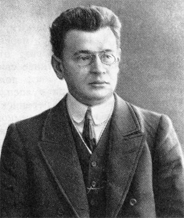 Аркадий АверченкоФото А.Т.Аверчнко